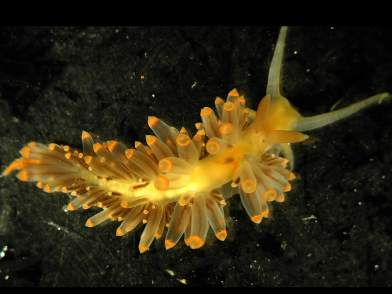 Facelina rhodopos, isla Lizard, Australia